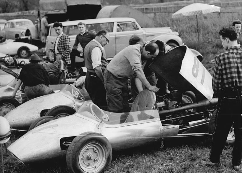 Zentralbild Kohls 23.4.1961 Auf der Halle-Saale-Schleife dröhnen die Motoren Am 23.4.1961 erfolgt um 10.00 Uhr der Start zum Internationalen Rennen auf der Halle-Saale-Schleife. Bereits in den frühen Morgenstunden des 22.4.61 trainierten die Fahrer und machten sich so mit dem schweren Kurs vertraut. UBz: Melkus (im hellen Pullover) sieht seinen Wagen nach dem Training im Fahrerlager durch.